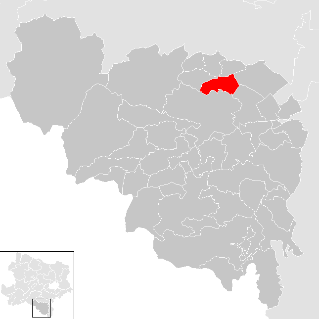 Bezirk Neunkirchen